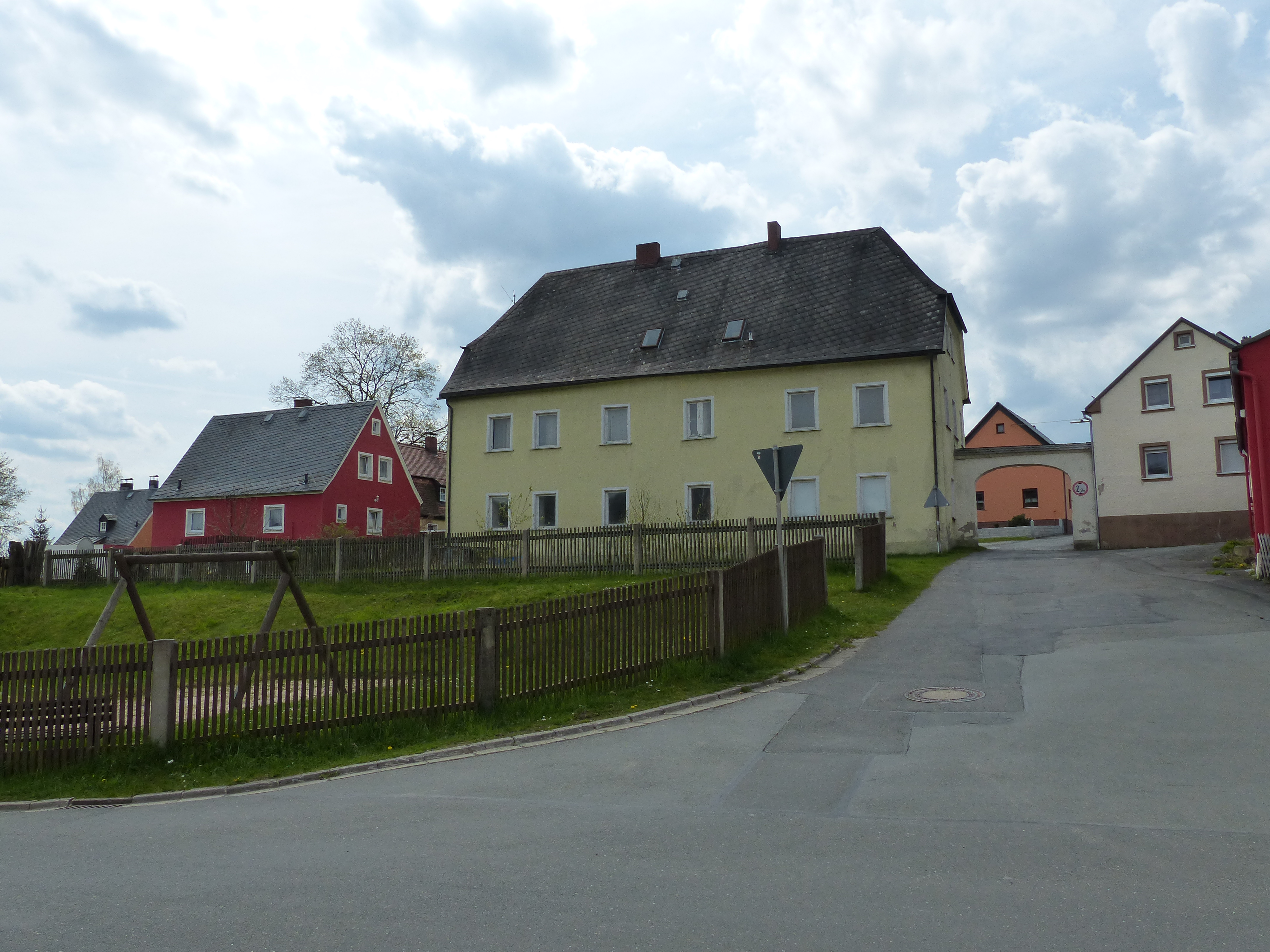 Serie Baudenkmäler und Ansichten von Regnitzlosau